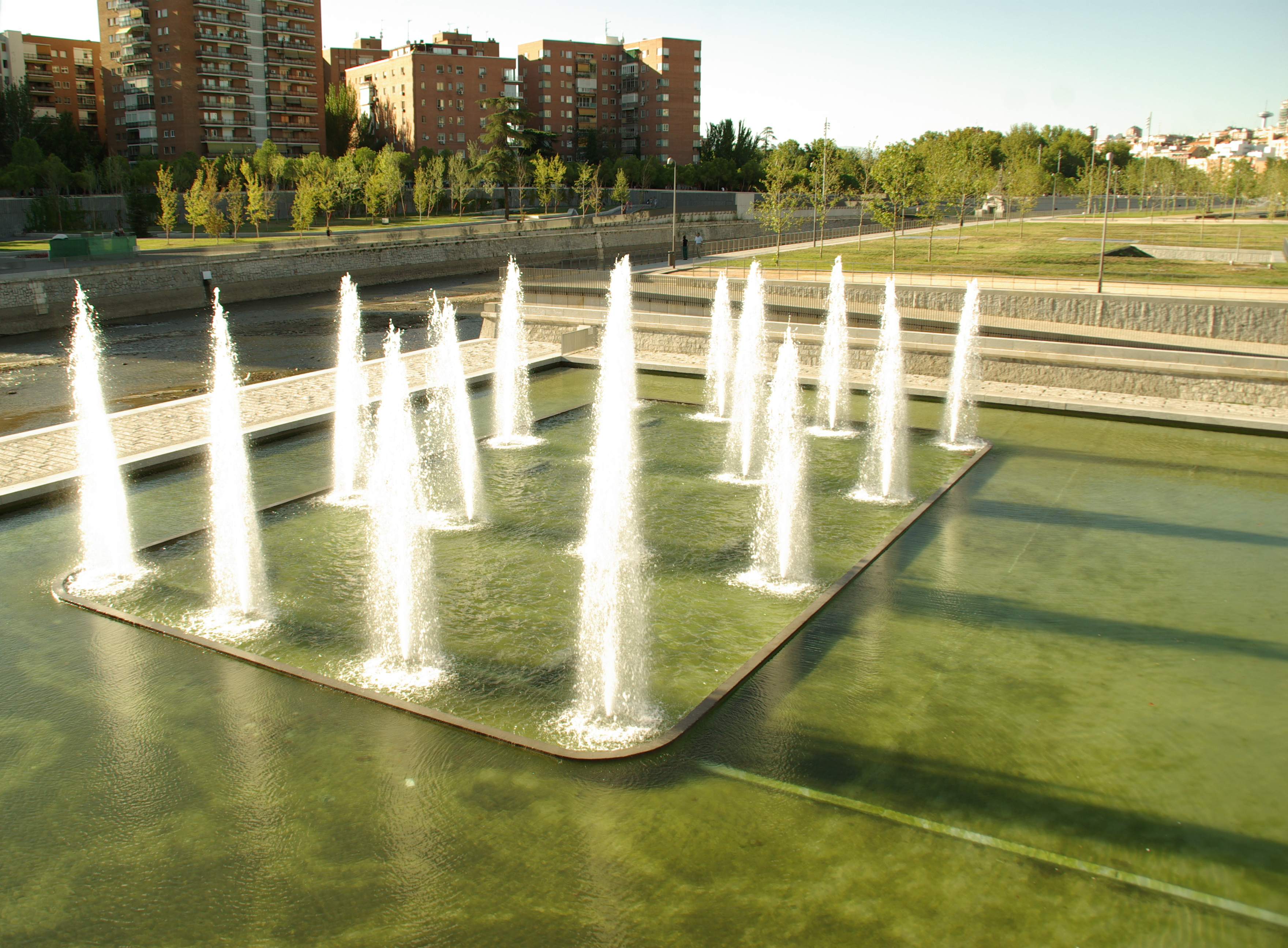 ® S.D. (ES,EN) MADRID PUENTE DE SEGOVIA BALLET